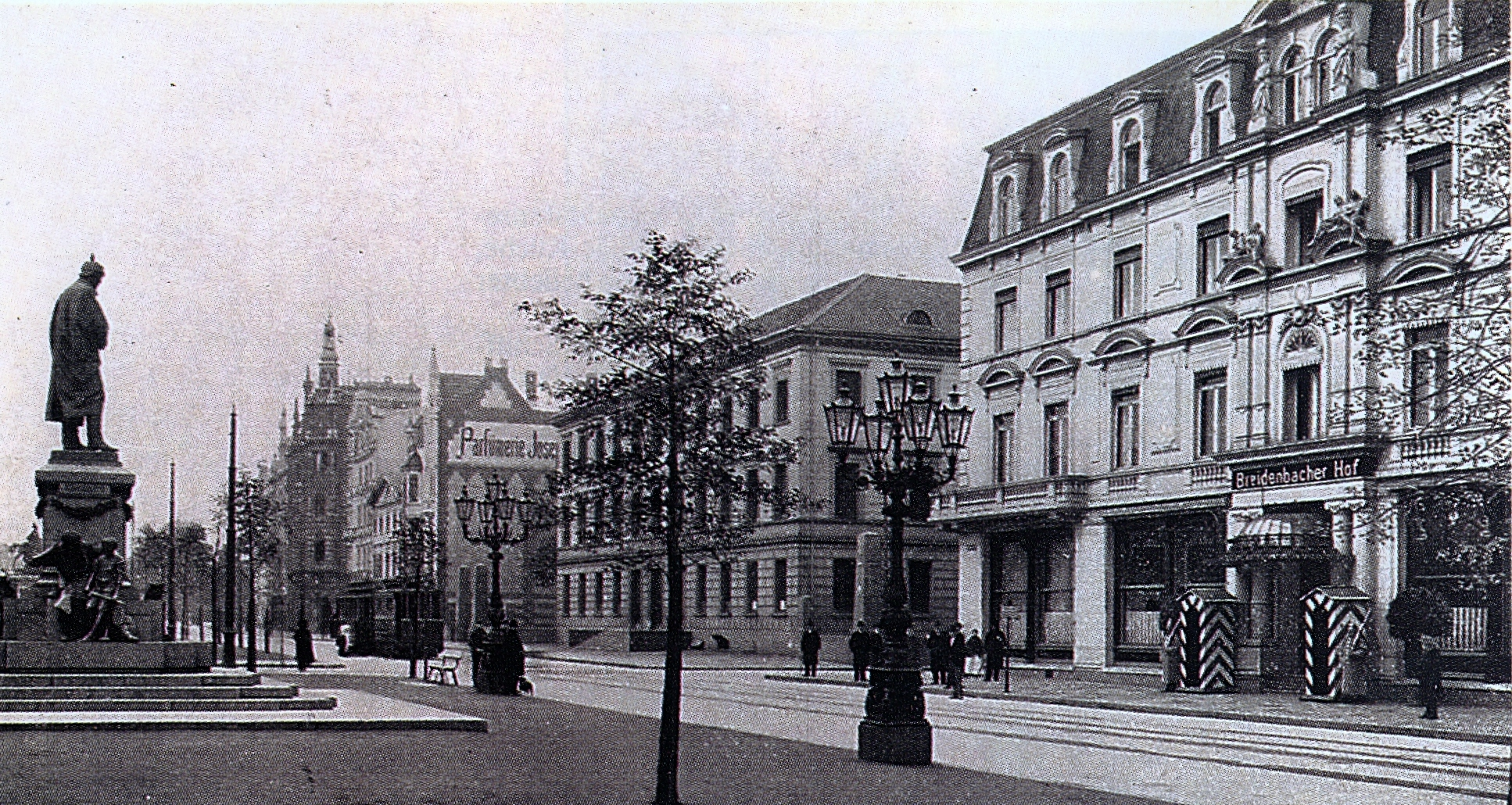 Alleestraße mit Königlichem Gymnasium Nr. 32, Breidenbach Hof Nr. 34 und Moltke-Denkmal